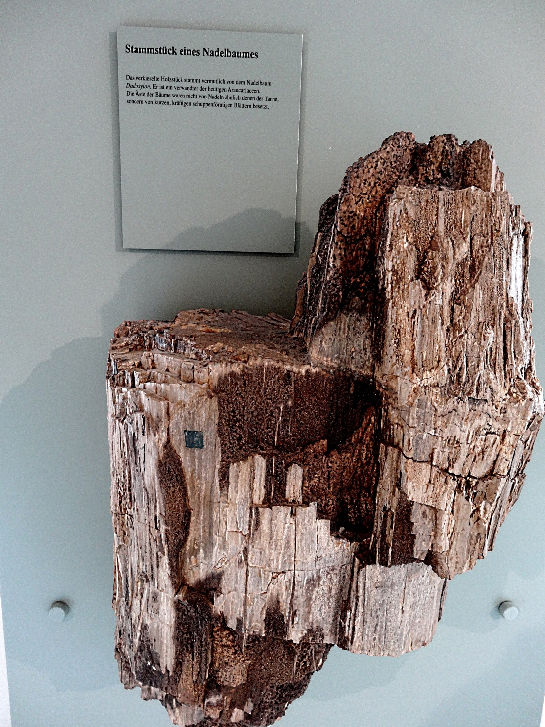 Nadelbaum Dadoxylon Stammfragment aus dem Schwarzen Jura der Fränkischen Alb; Fundort nahe Bad Staffelstein /Oberfranken; Exponat in der Petrefaktensammlung Kloster Banz